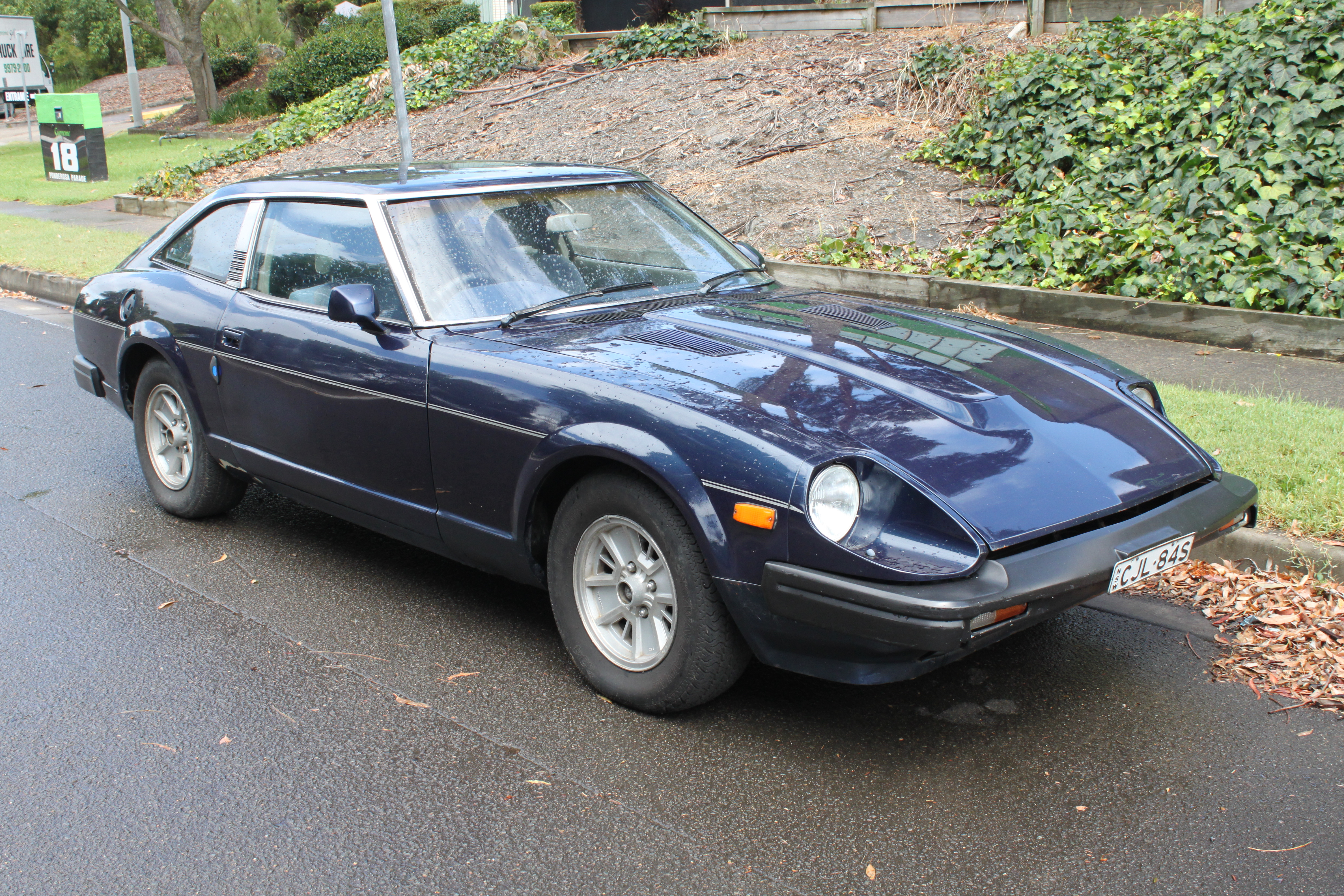 Datsun 280ZX S130